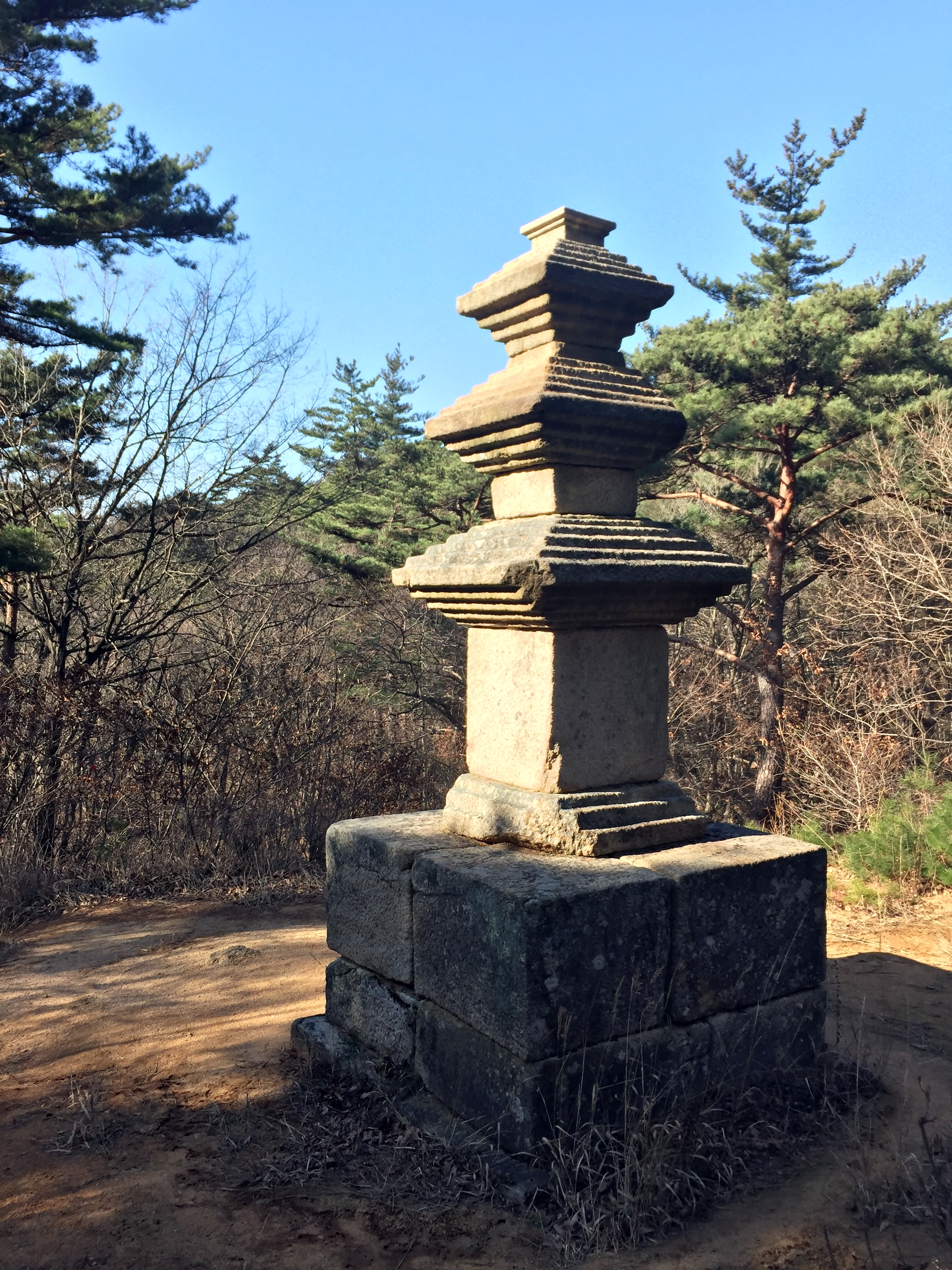 경주 남산 용장계 지곡 제3사지 삼층석탑